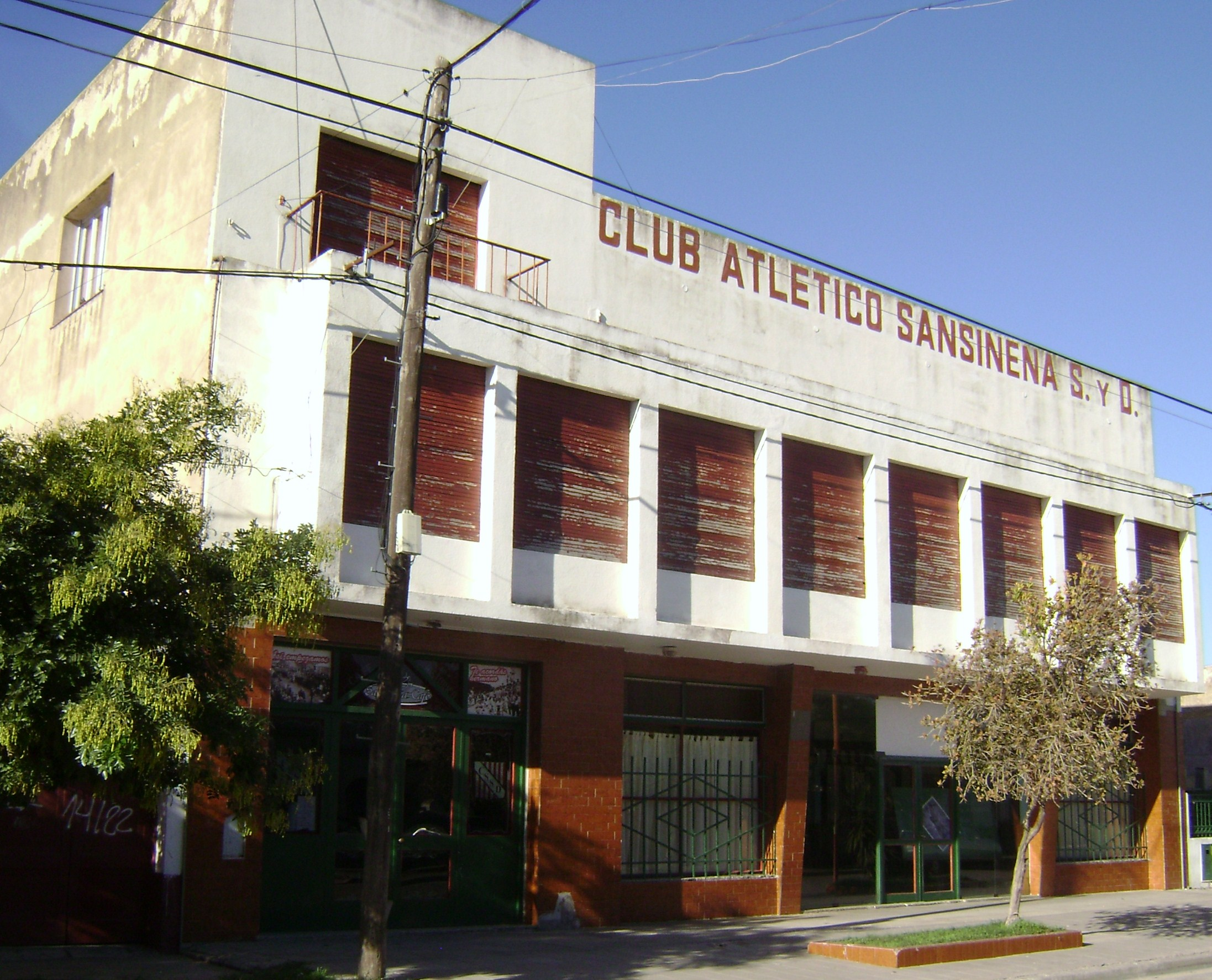 Frente de la sede social del Club Sansinena